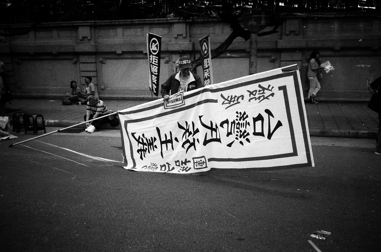 NoNukw 0430